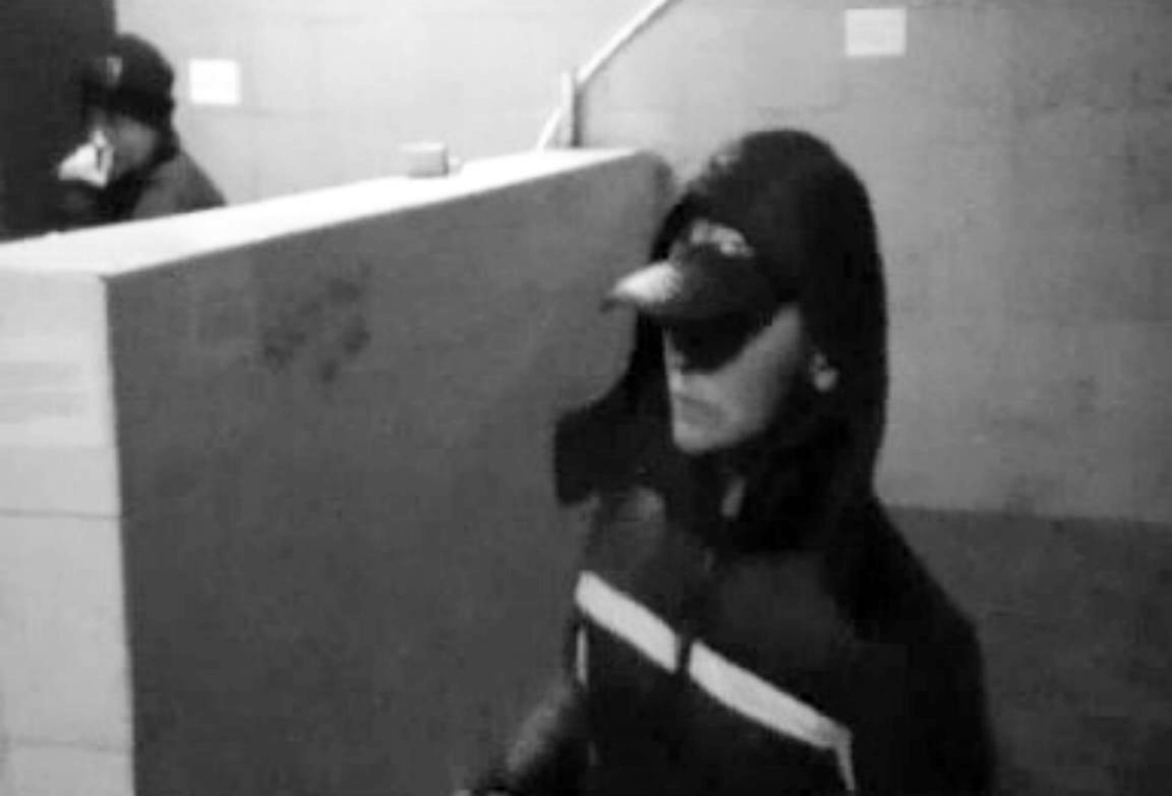 акция художников Н. Дурицкой и С. Сапожникова в общественного туалета на Газетном